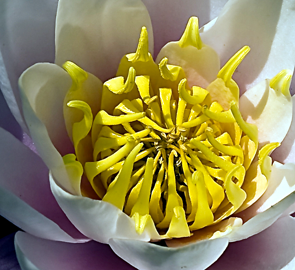 Weiße Seerose